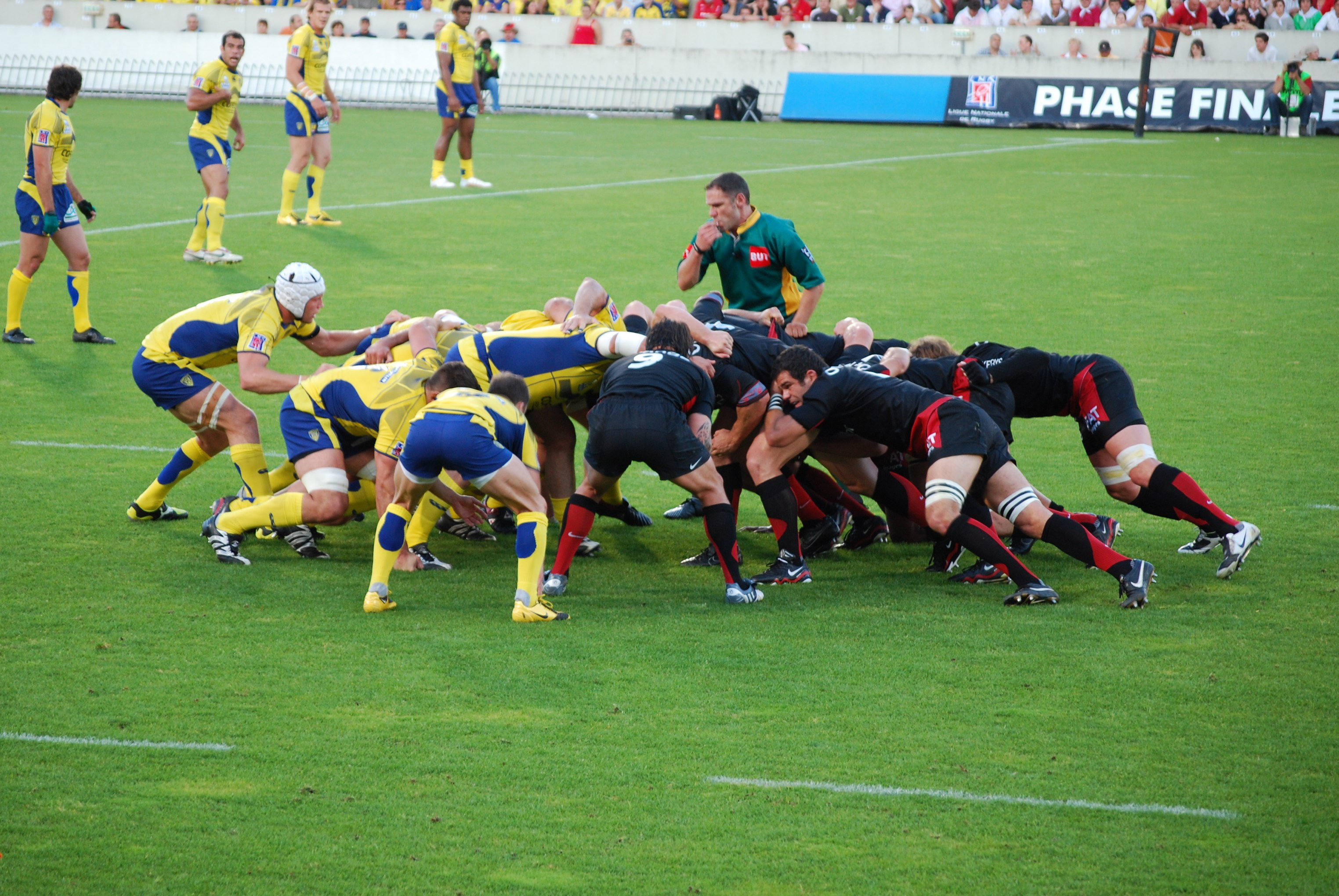 demi-finale de top 14 2008-2009 opposant Clermont à Toulouse